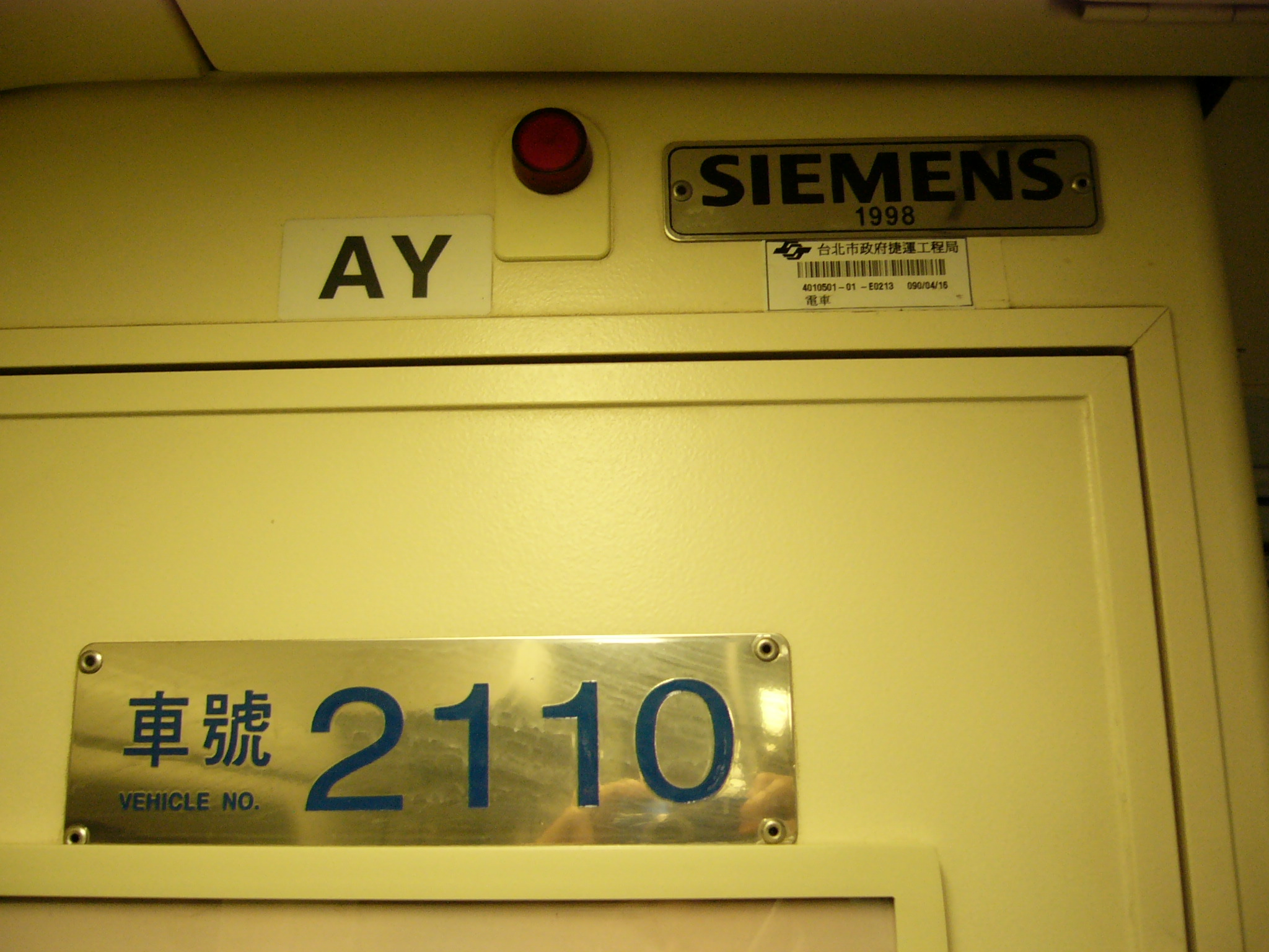 台北捷運321型電聯車內的西門子銘板（右上）與車號銘板（左下）